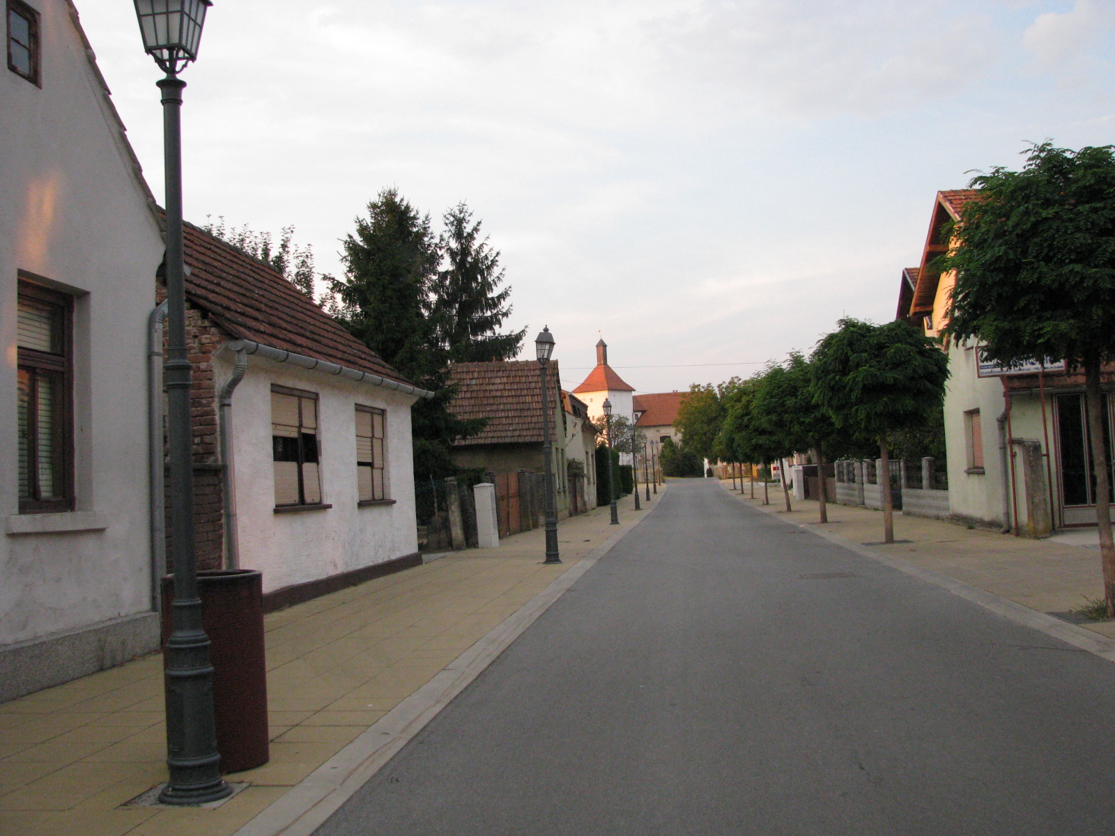 Ulica u Đurđevcu Unknown